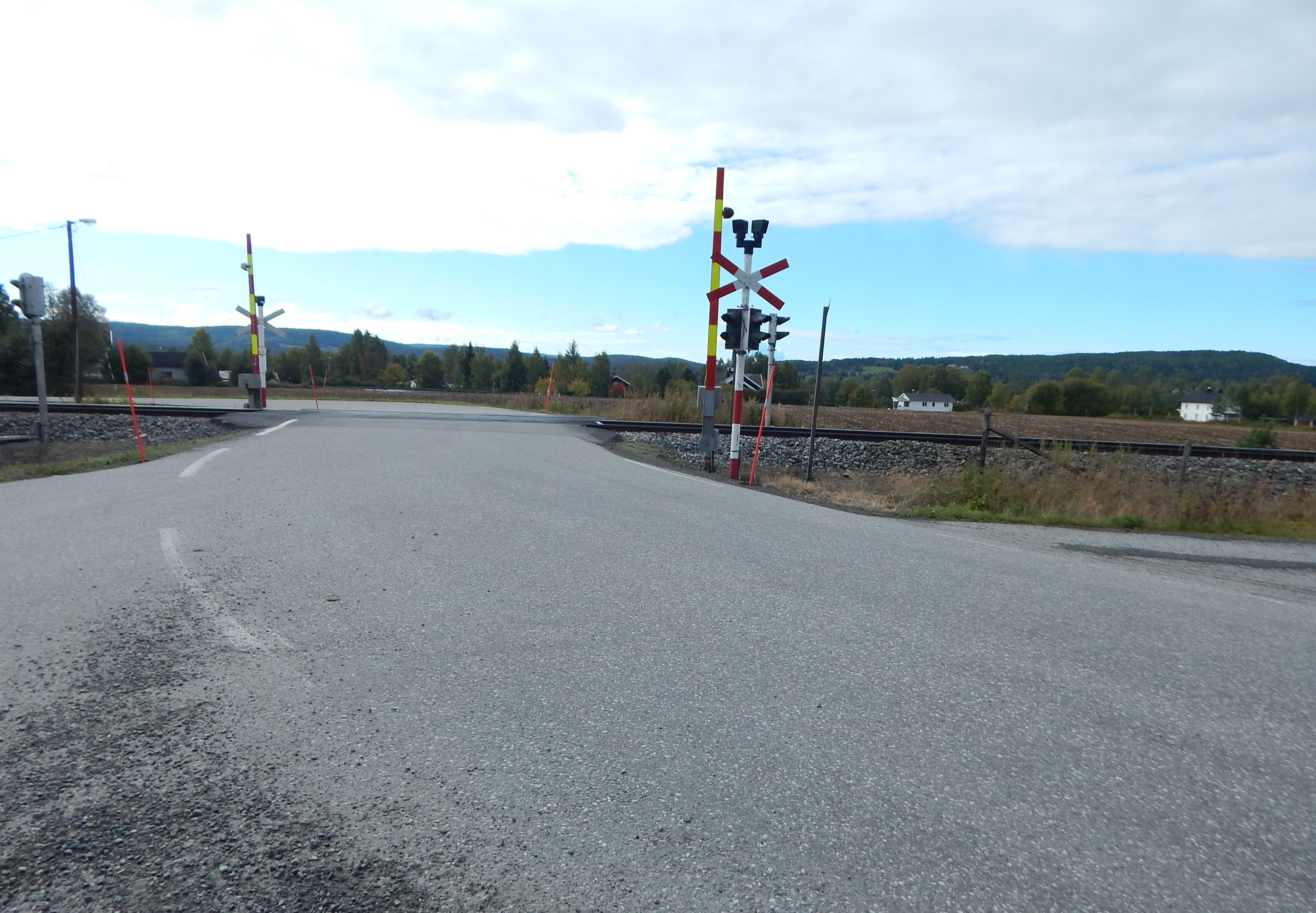 Nøtåsvegen (fylkesvei 530) krysser Solørbanen nordvest for Heradsbygd stasjon.